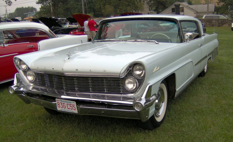 1959 Lincoln Premiere Coupe